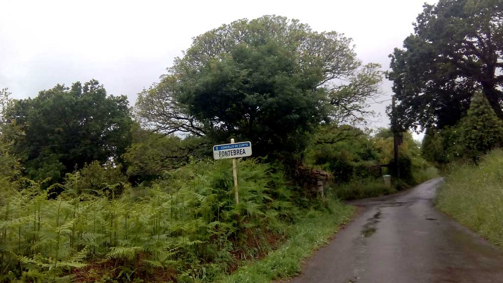 Vista de Fontebrea, Curtis.